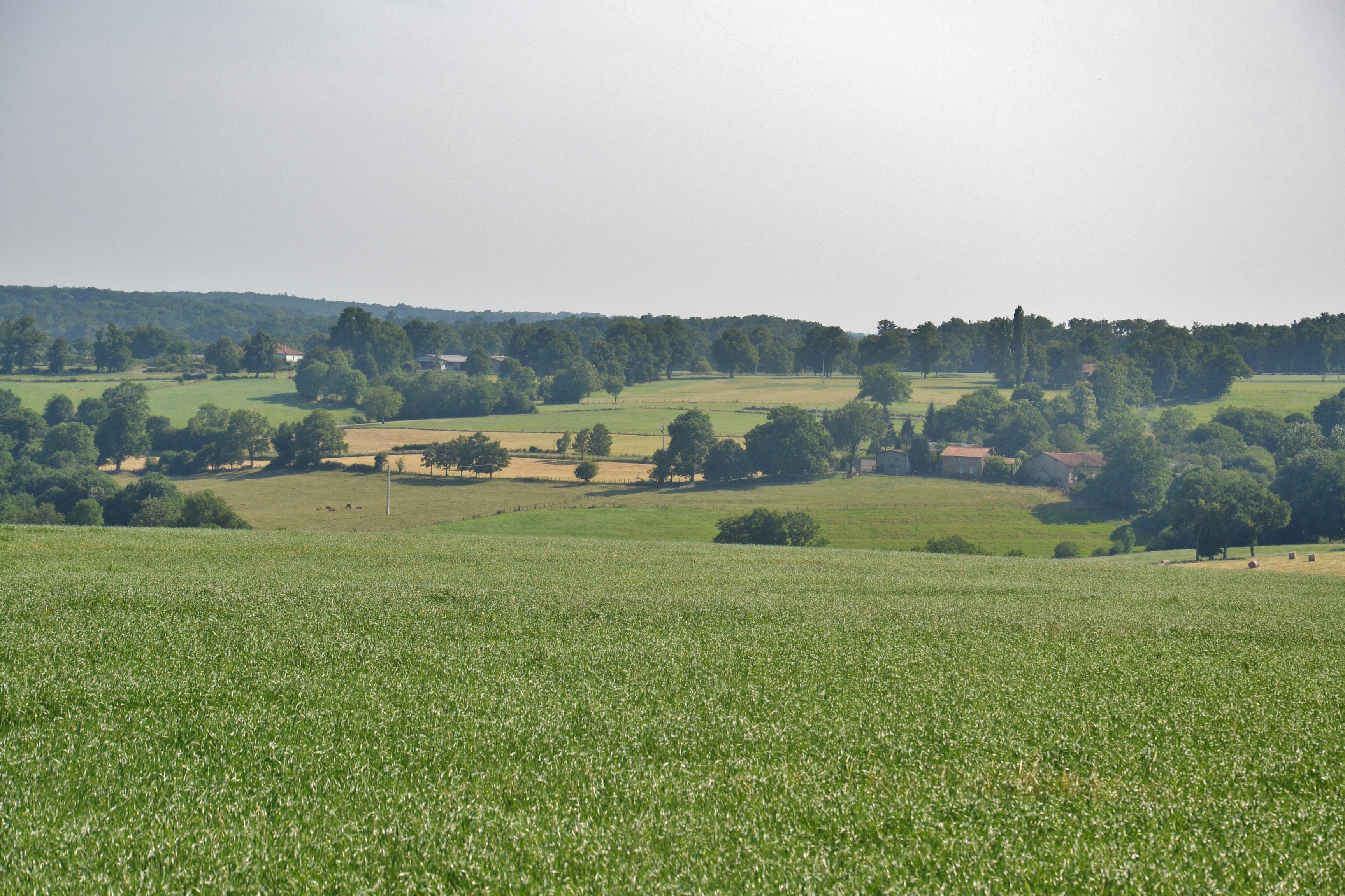 Paysage vallonné et agricole de la Charente limousine.